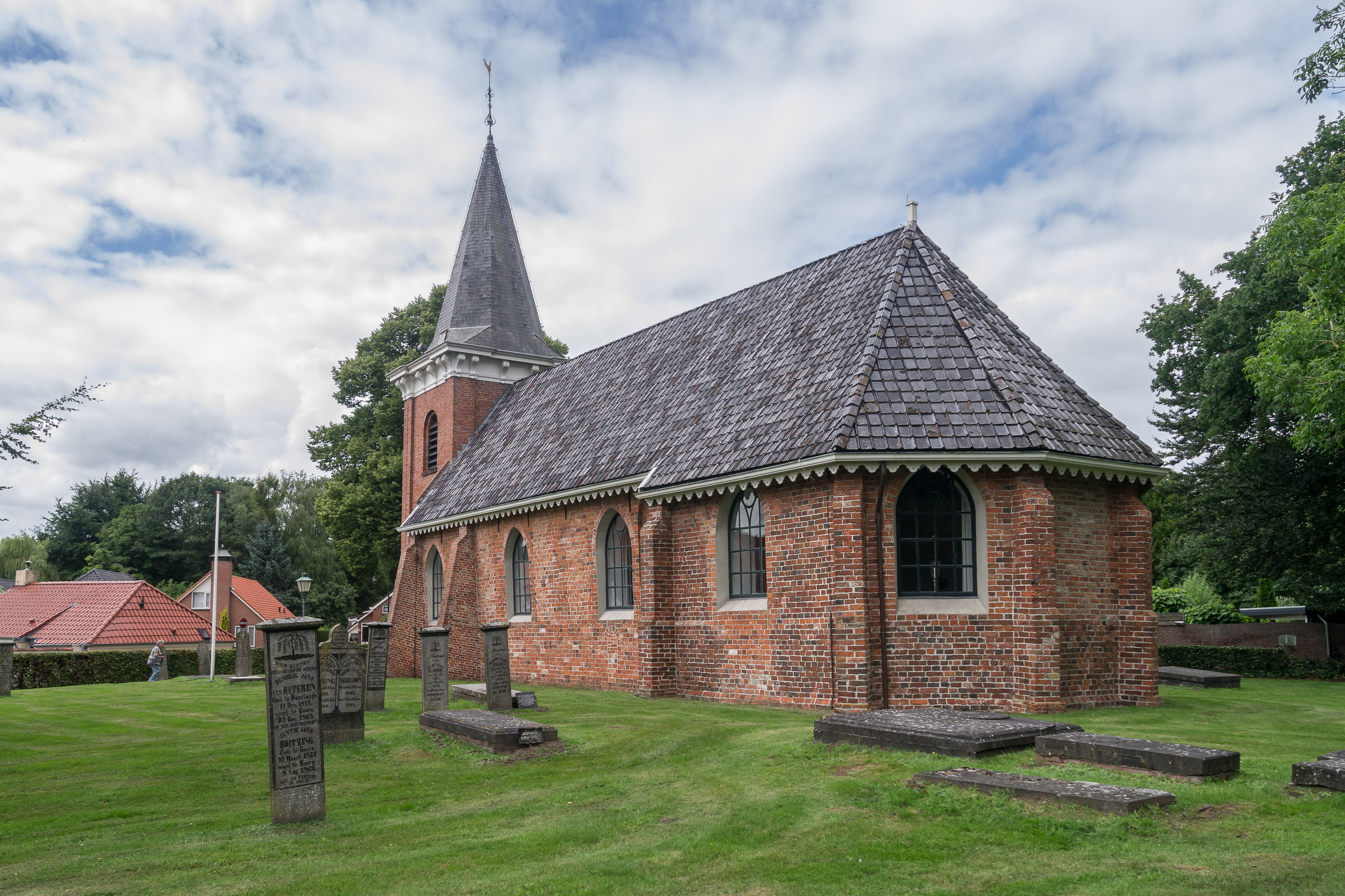 De hervormde kerk van Wedde (Zuidwest zijde)